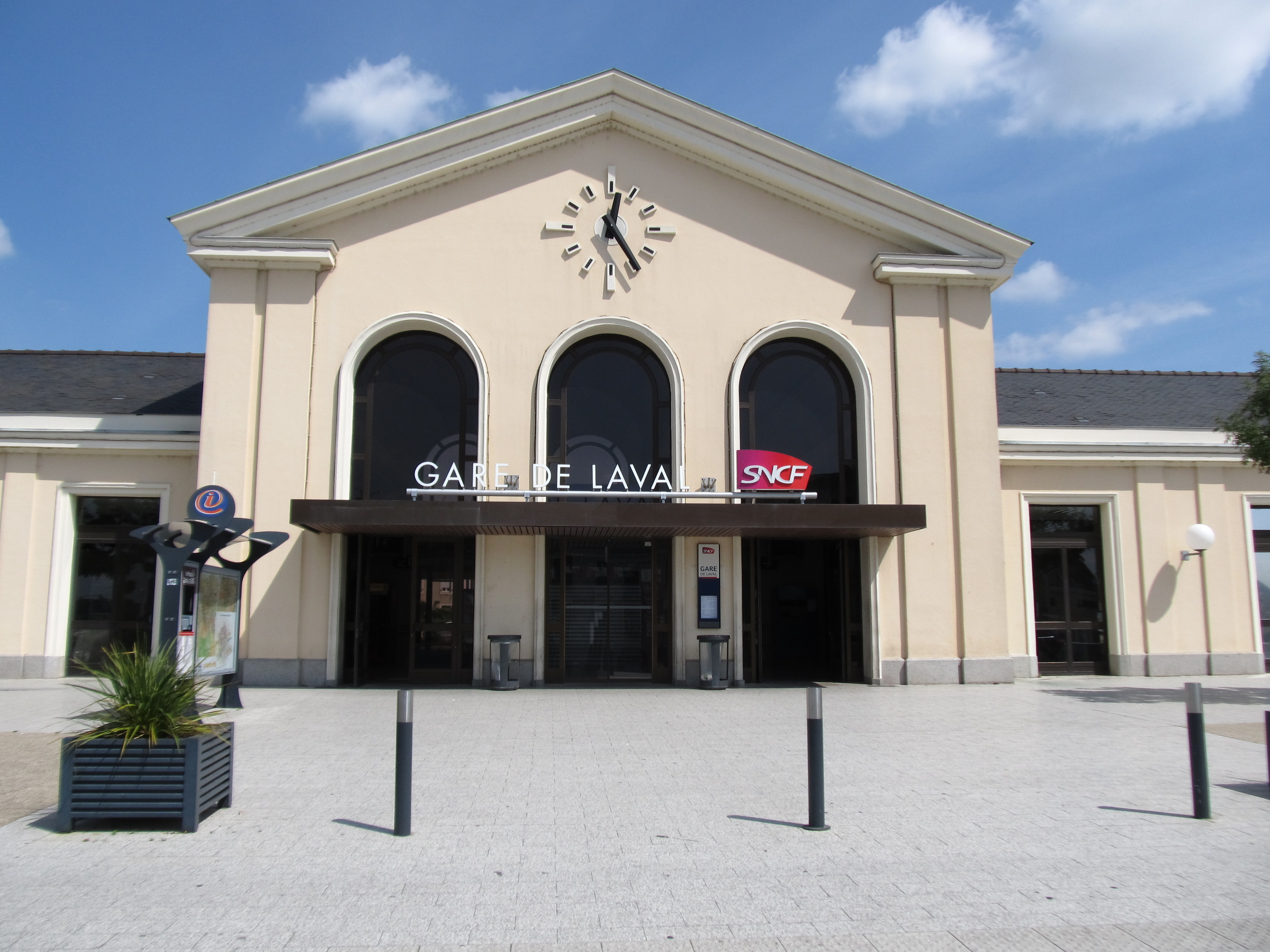 Gare de Laval, Mayenne, France